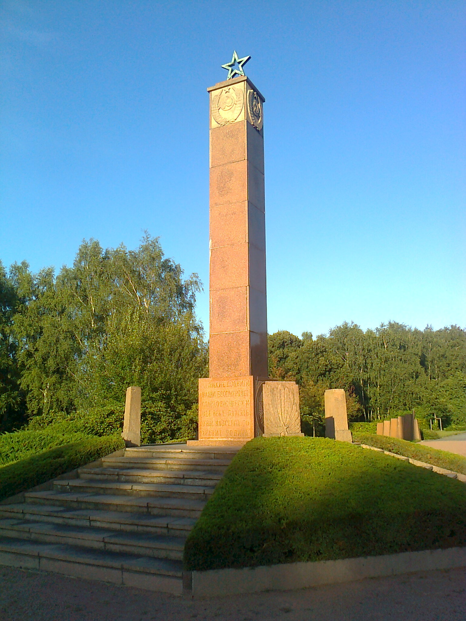 Sowjetisches Ehrenmal auf dem Friedhof Berlin-Marzahn